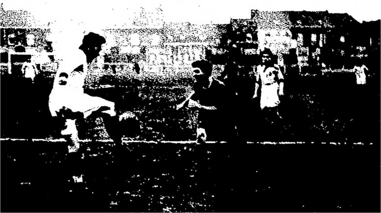 Dimanche 4 février 1934 à Tourcoing, 8e de finale de la Coupe de France de football 1933-1934 entre l'Amiens AC et le CA Paris. Dégagement de l'arrière droit amiénois Balavoine malgré une charge de Damour.